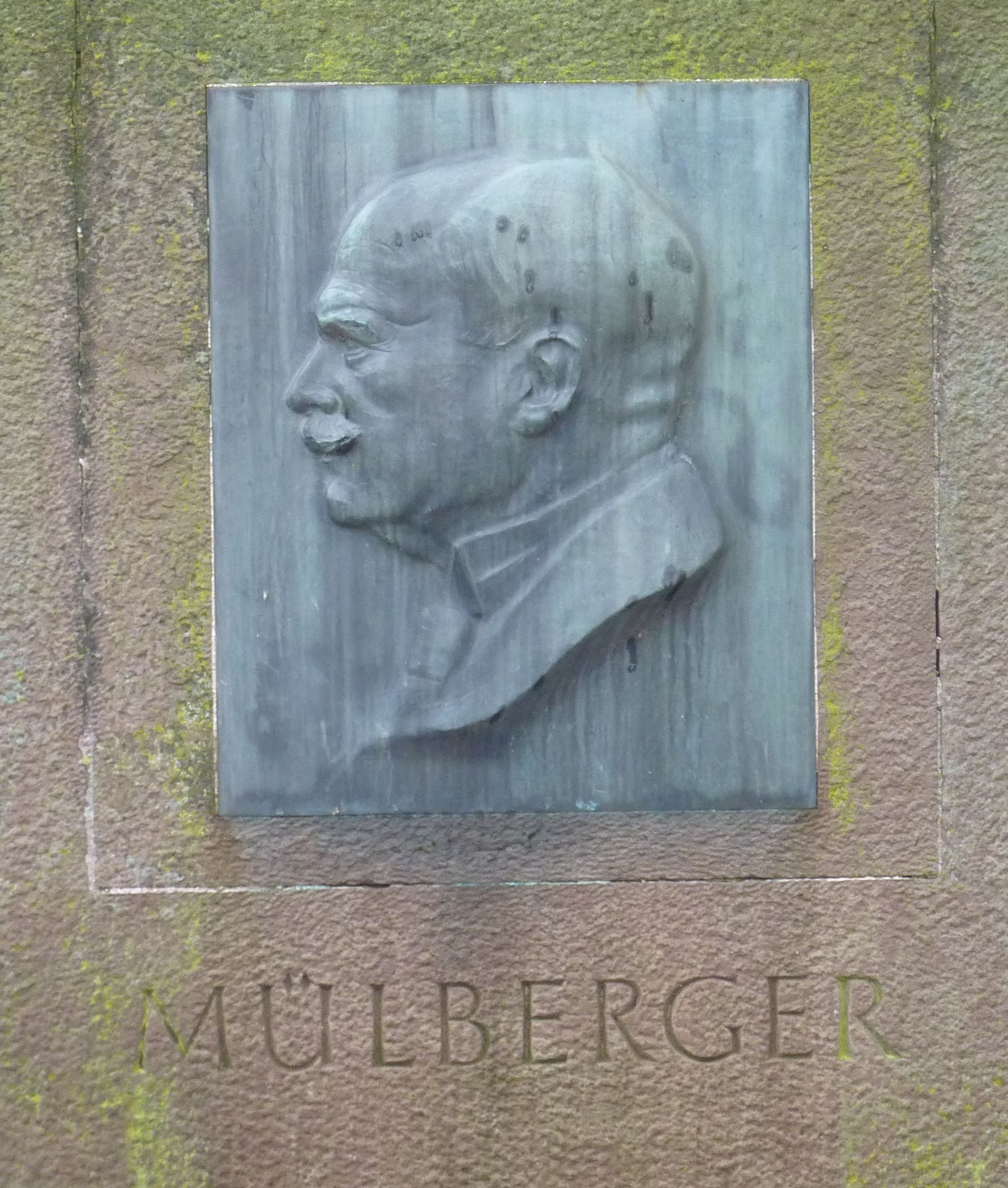 Porträtrelief Max von Mülberger in der Mülbergerstr. in Esslingen, Ecke Grüner Weg